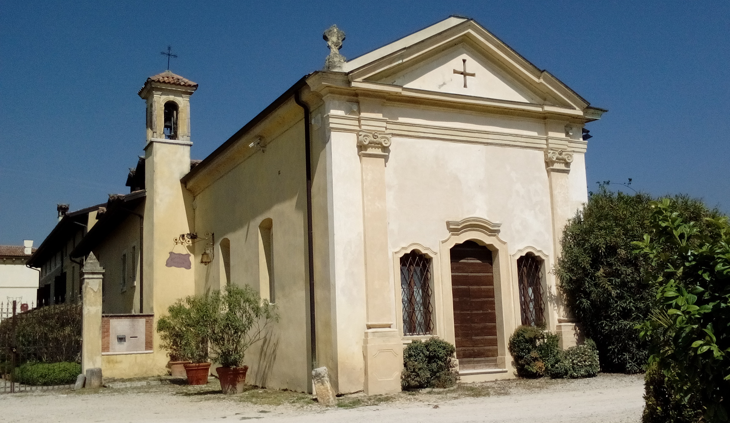 Cappella della Villa del Quar. Pedemonte, frazione di San Pietro in Cariano.